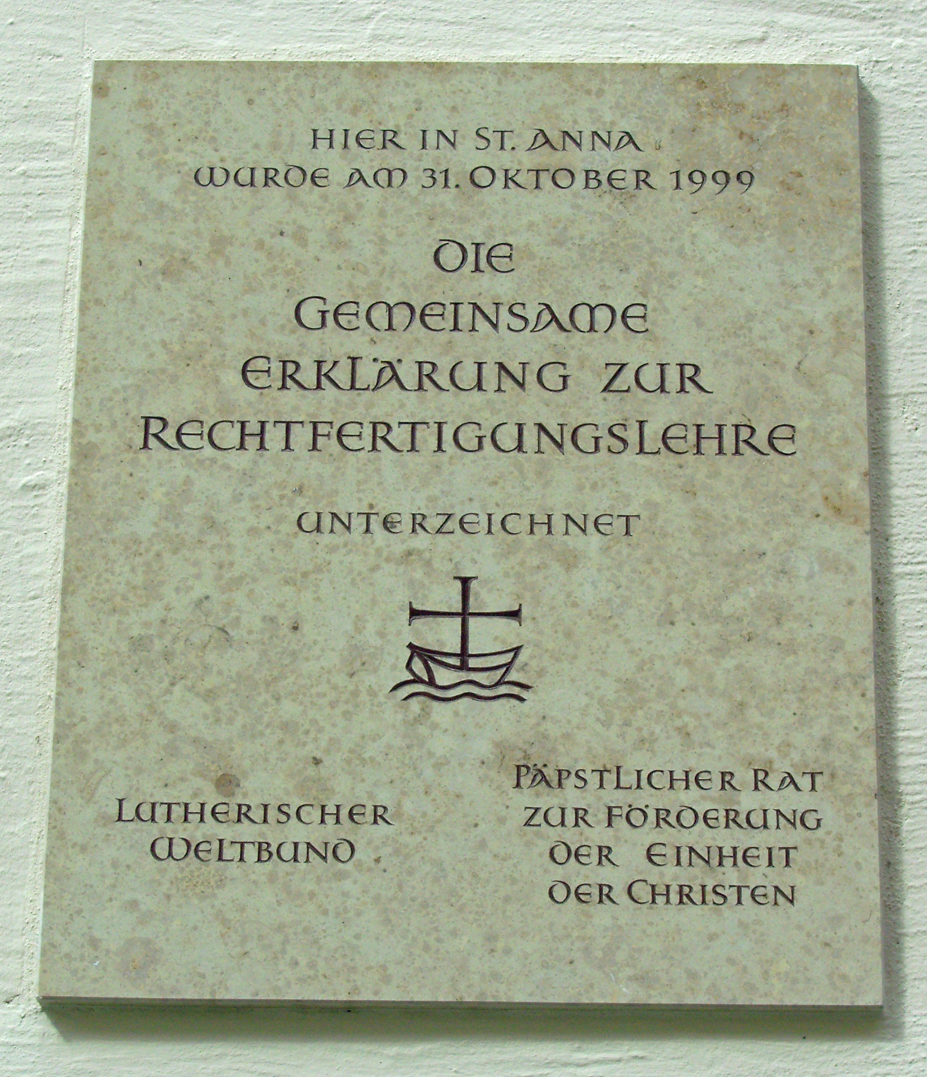 Tafel zum Gedenken an die Gemeinsame Erklärung zur Rechtfertigungslehre 1999, St.-Anna-Kirche Augsburg.